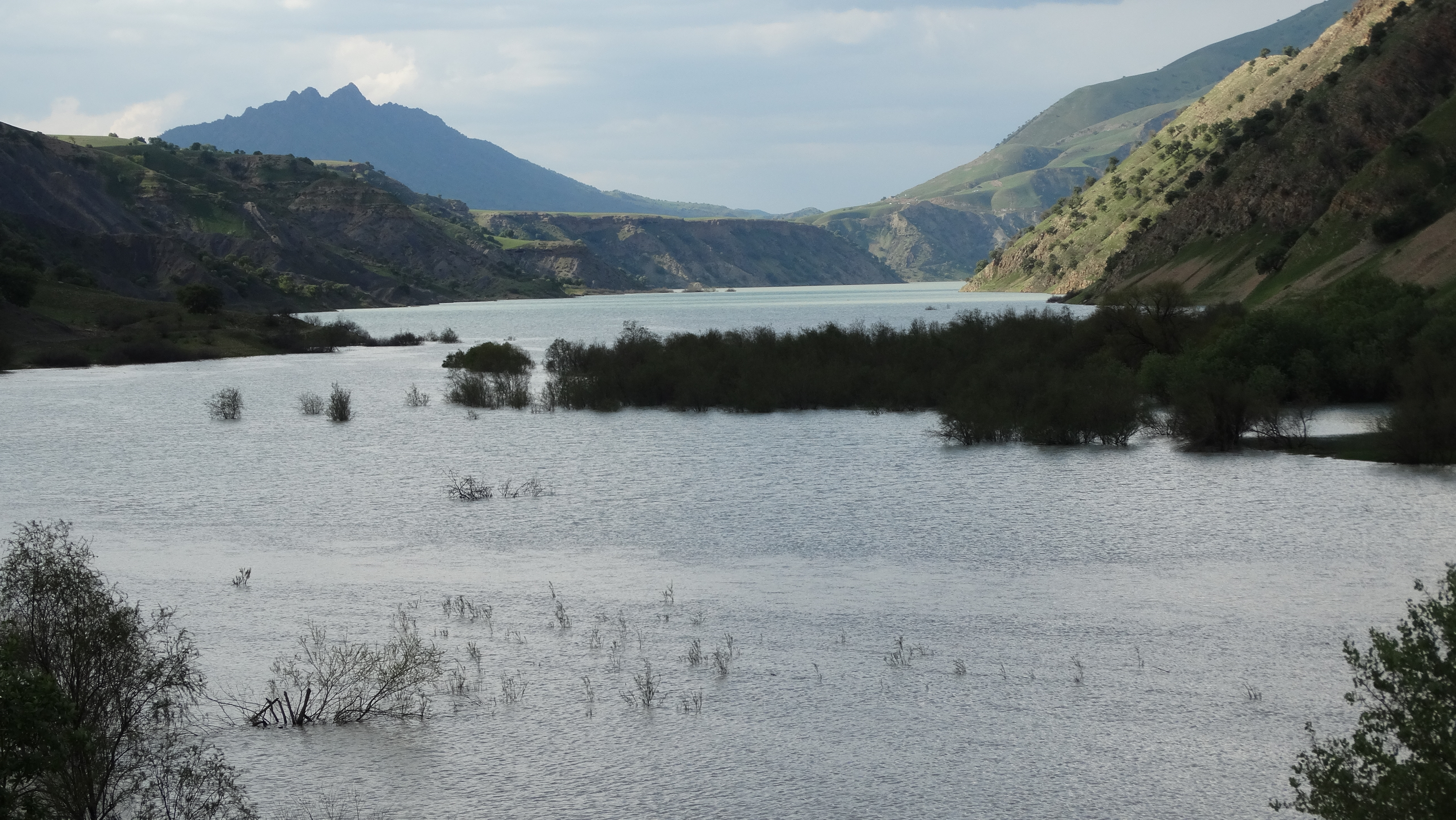 رود لیله و در ادامه آن می‌توان رود سیروان در مرز ایران و عراق را دید. (مکان: چند کیلومتری روستای کلور در شهرستان جوانرود از توابع استان کرمانشاه.)